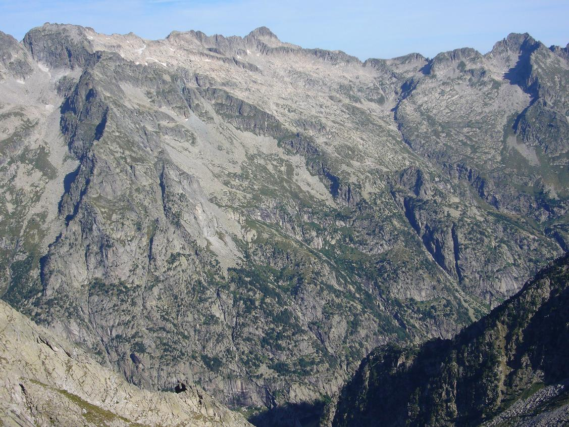 Massís Besiberri vist des dels Pics de Comaltes. la Vall de Boí, Alta Ribagorça, Catalunya